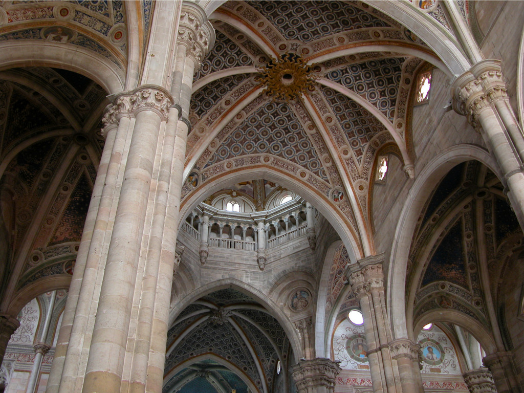 Foto da me realizzata.